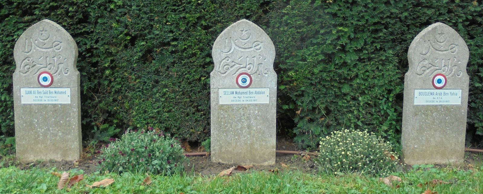 Sépultures au cimetière de Pantin de trois tirailleurs tunisiens ayant participé à la Première Guerre Mondiale